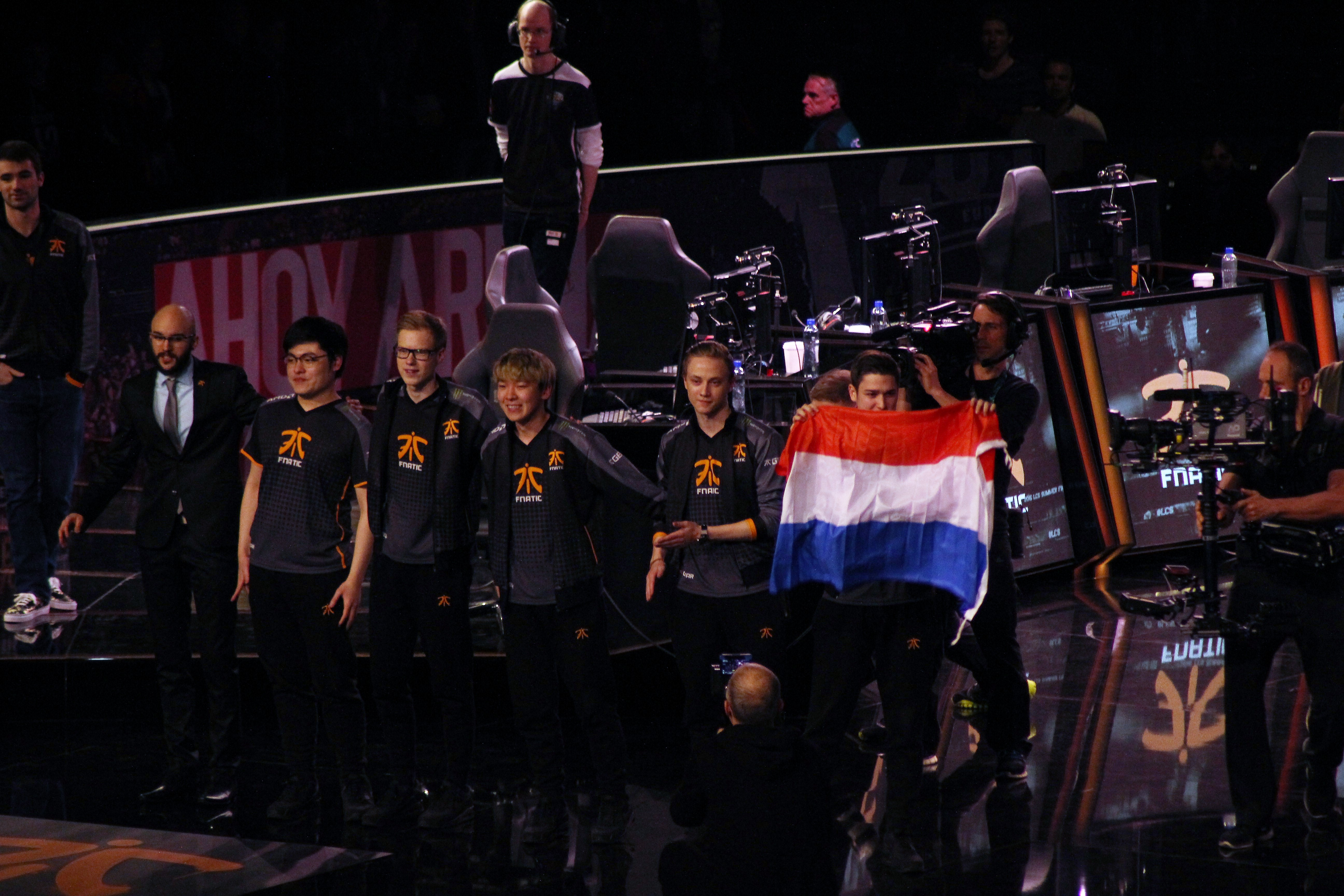 Состав Fnatic по LoL перед матчем за 3 место EU LCS Spring 2016 на Ahoy Rotterdam